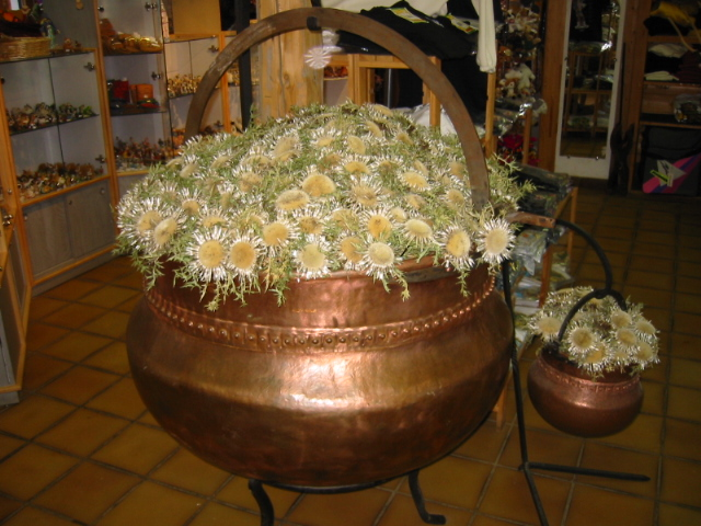 Chardons du Haut Doubs